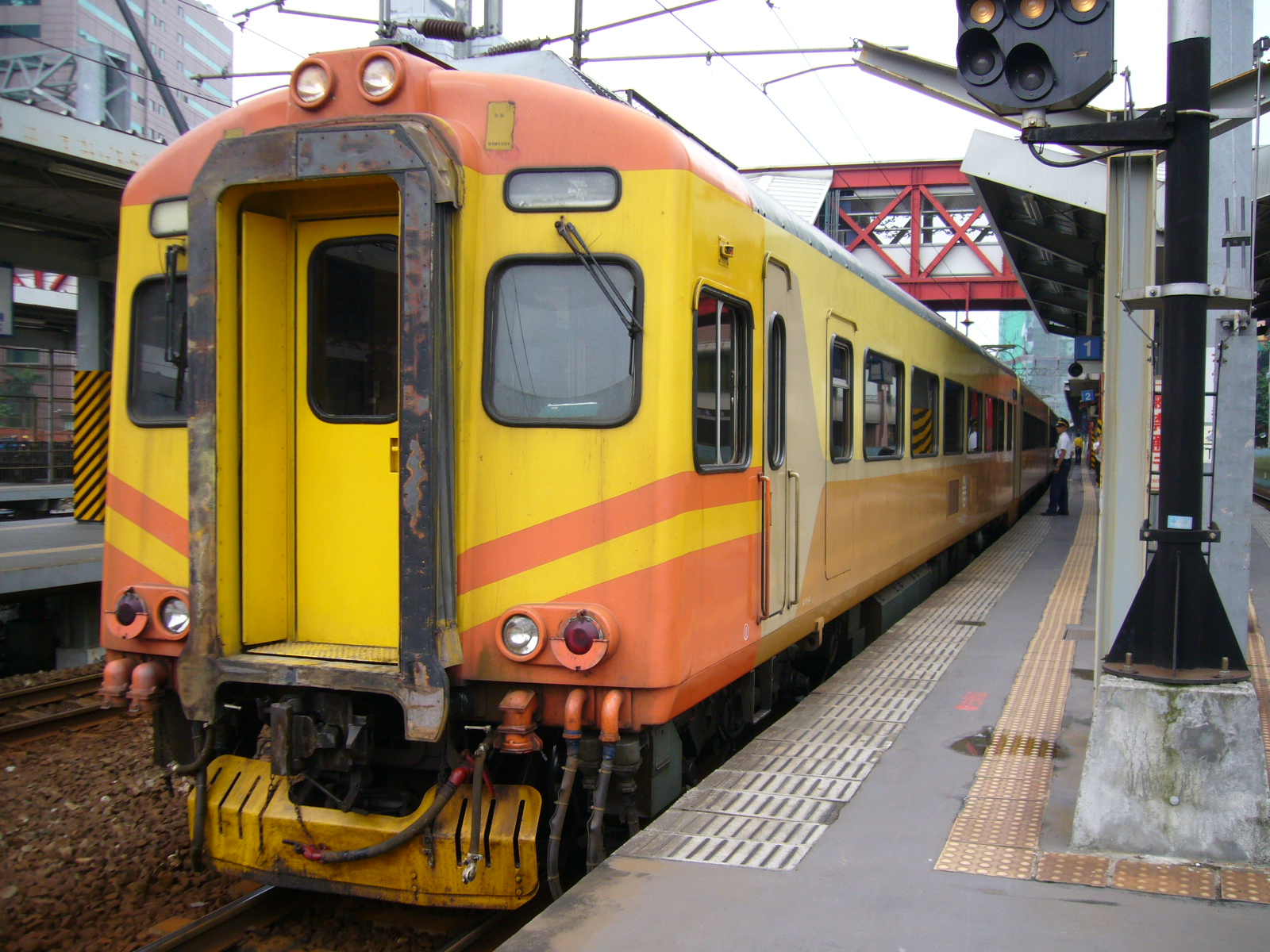 EMU300回送，七堵操車場まで樹林操車場へ